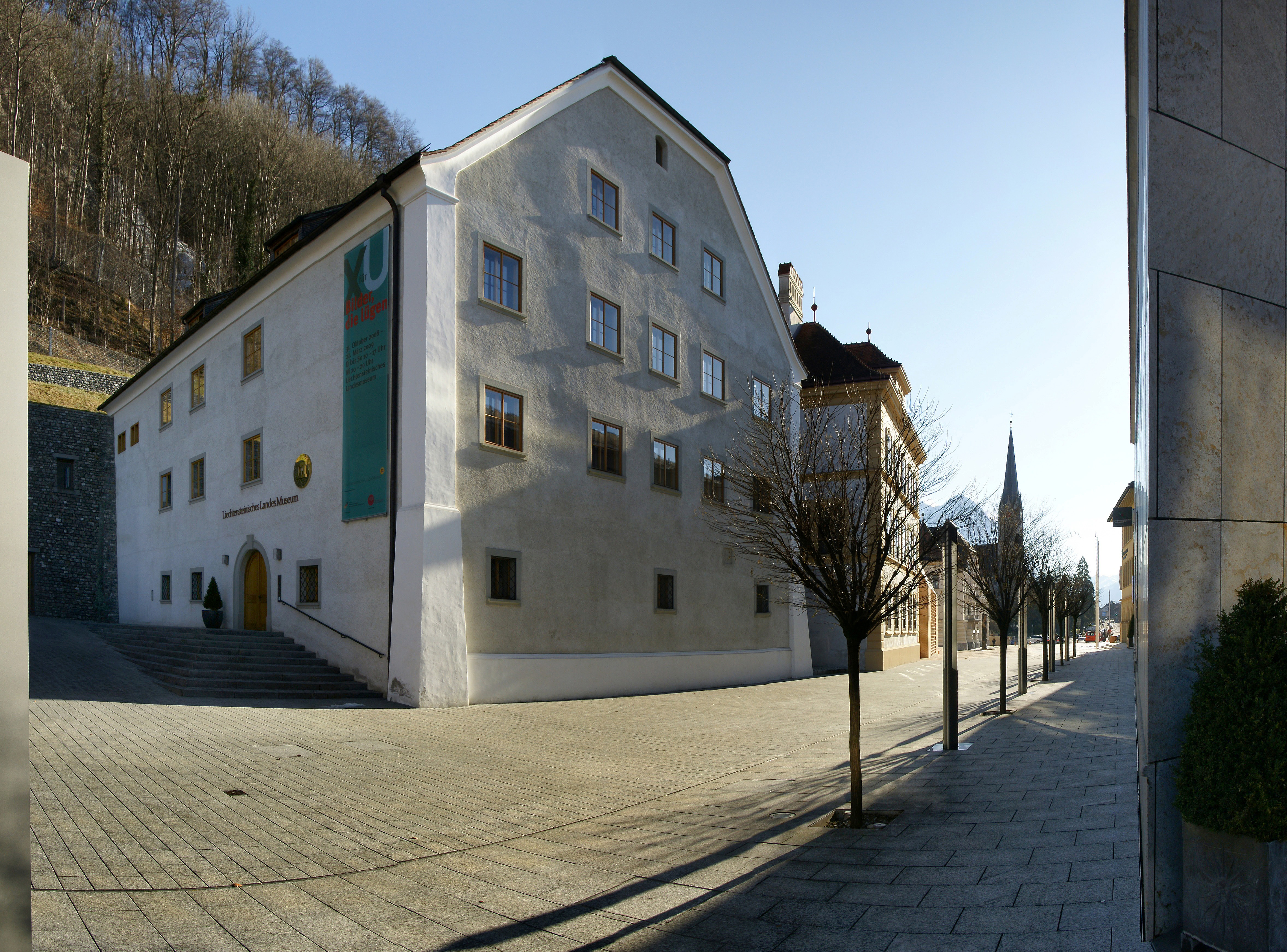 Panorama aus mehreren Bilder. Das Liechtensteinische Landesmuseum in Vaduz.